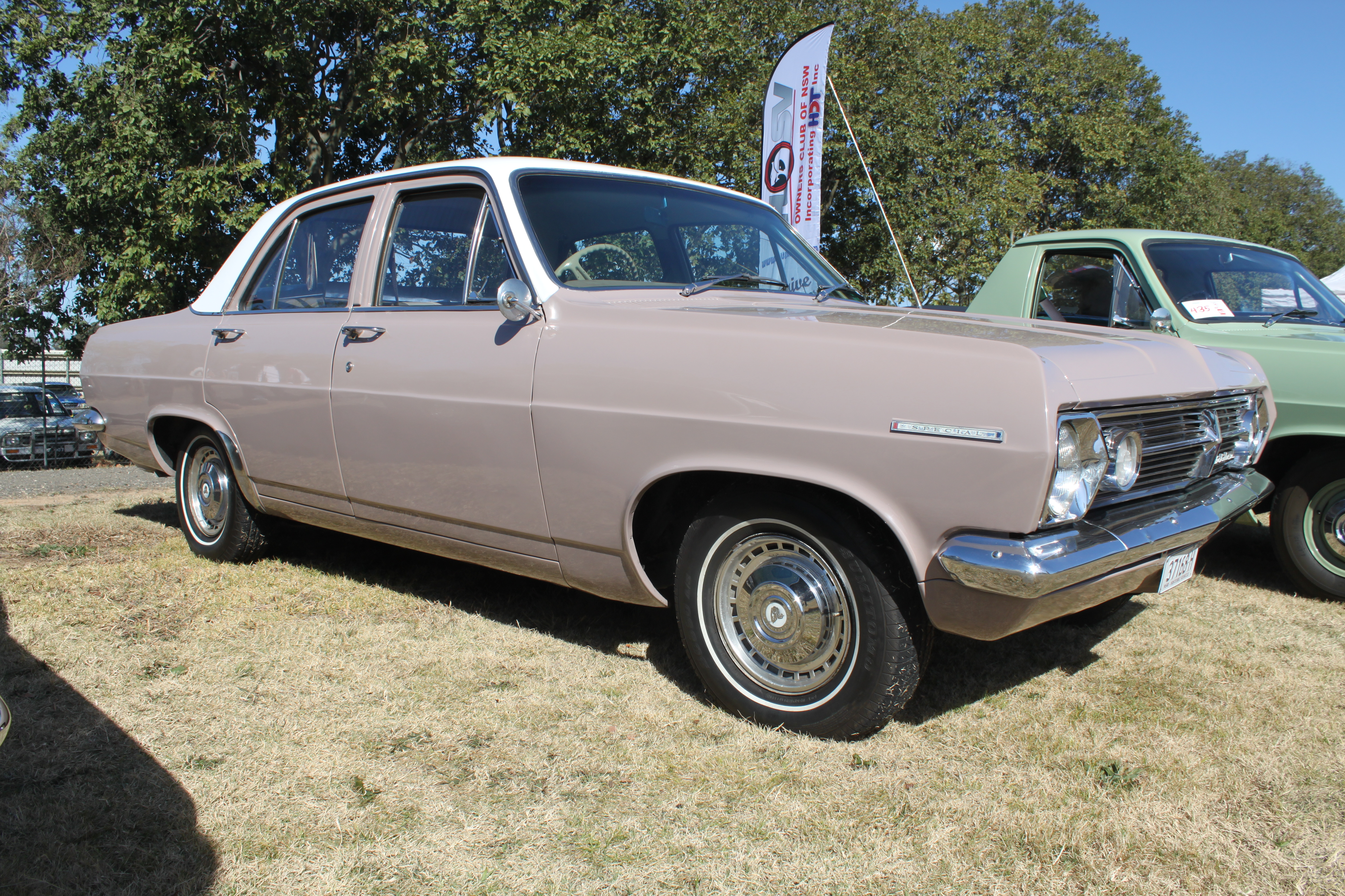 Holden HR Special